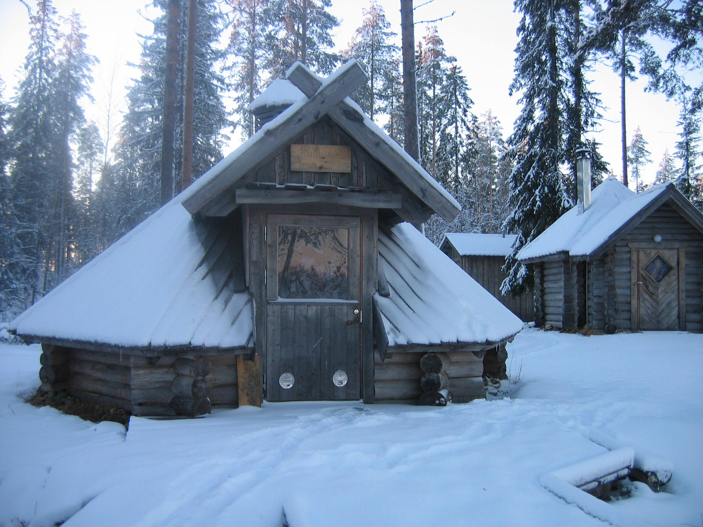 Lake Valkeinen's rental shelter in Sanginkylä, Utajärvi, Finland.